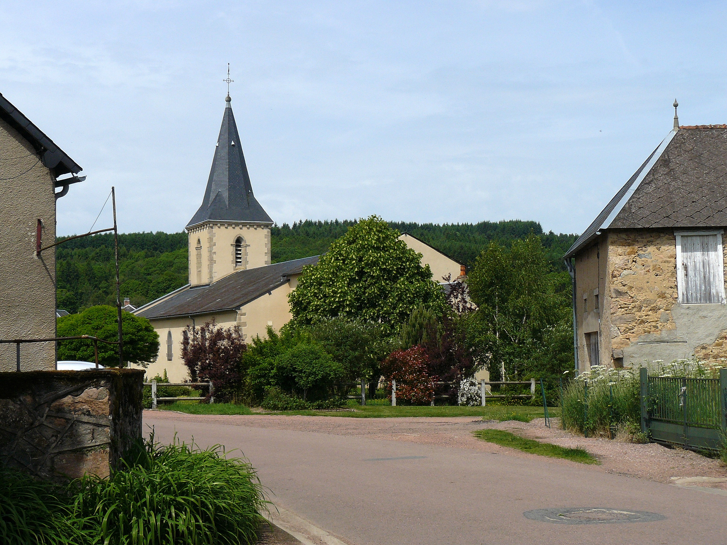 Roussillon-en-Morvan (Saône-et-Loire, France)